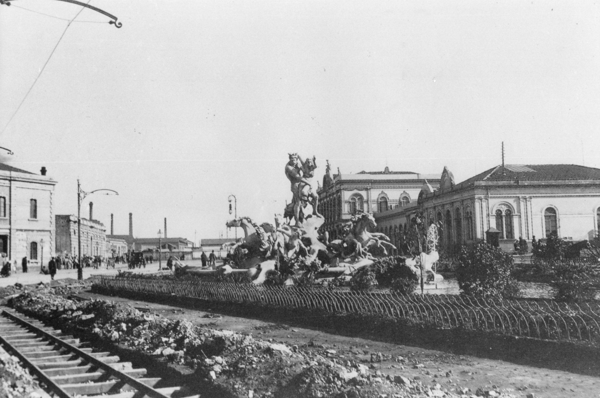 Linea tranviaria in revisione in prossimità della stazione centrale di Catania (tra 1906 e 1907)